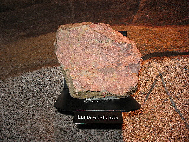 Fotografia Digital realizada por Pablo Alberto Salguero Quiles Tomada de Categoría:Minería (imagen)